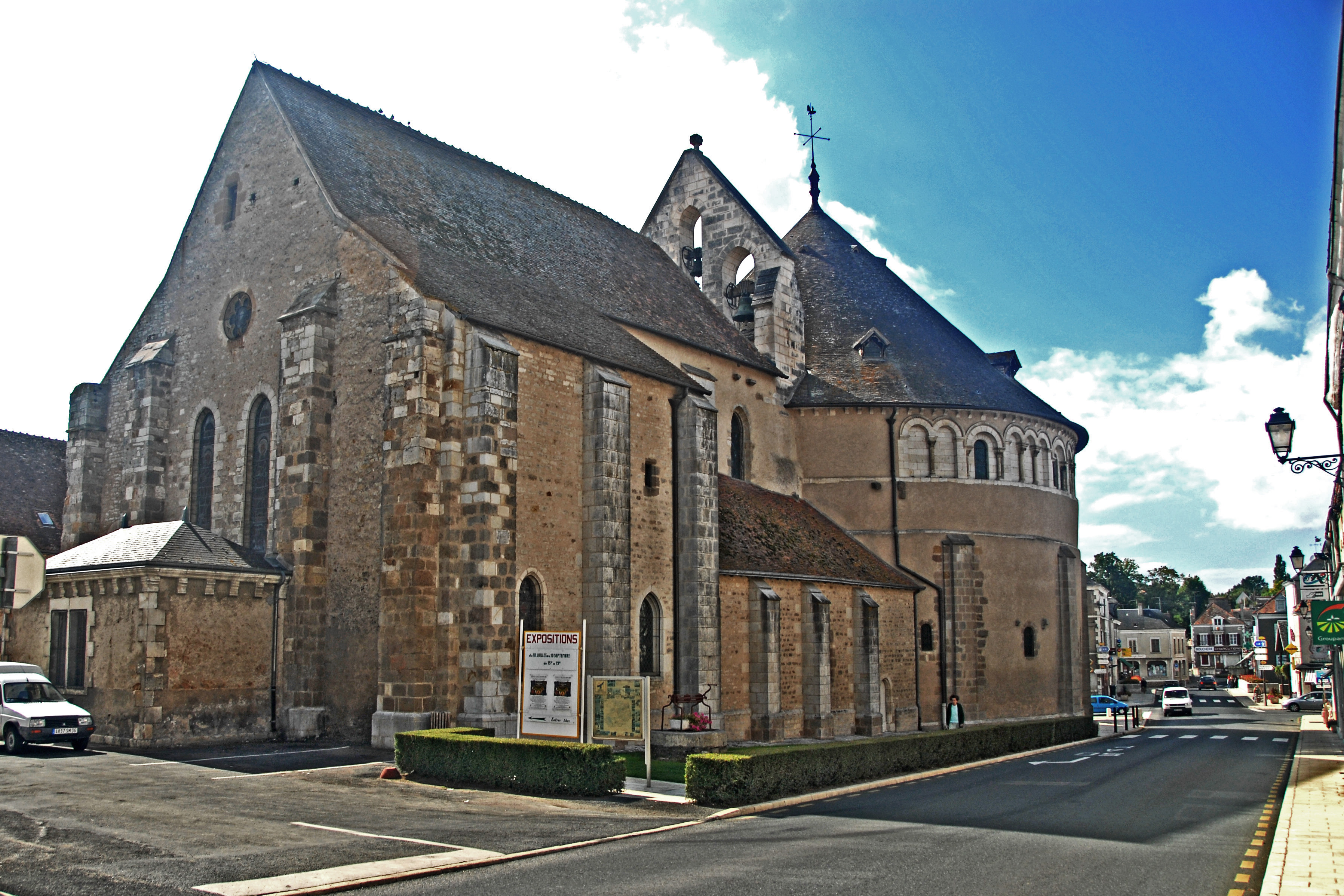 Neuvy_St.-Sépulcre, Stiftskirche von O